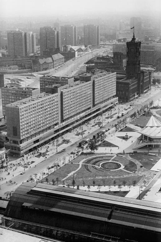 Berlin, Stadtzentrum ADN-ZB Koard 23.7.73 Berlin: Vorbereitung X.-Ein Blick aus luftiger Höhe auf die modernen Bauten der Gastgeberstadt lohnt sich.